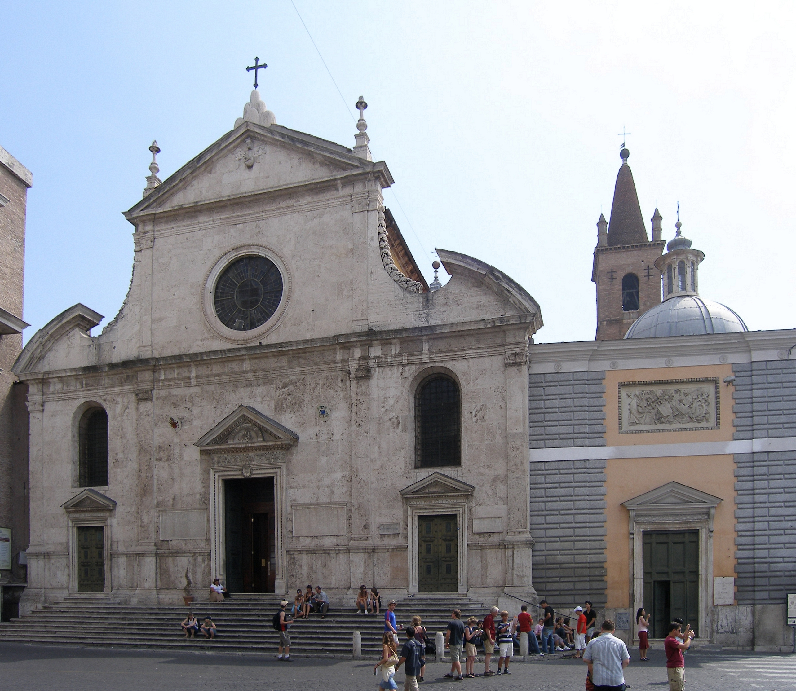 Rom, Basilika Santa Maria del Popolo, Außenansicht